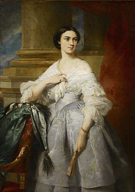 Marie Amalie Elisabeth Karoline, 1817-1888. Tochter von Großherzog Karl und Großherzogin Stephanie, geb Beauharnais, heiratete am 23.02.1843 in Mannheim William Alexander Douglas-Hamilton, 11. Herzog von Hamilton